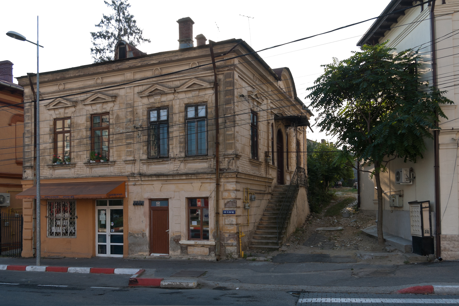 Fotografia prezinta Casa Popescu vazuta dinspre NV.